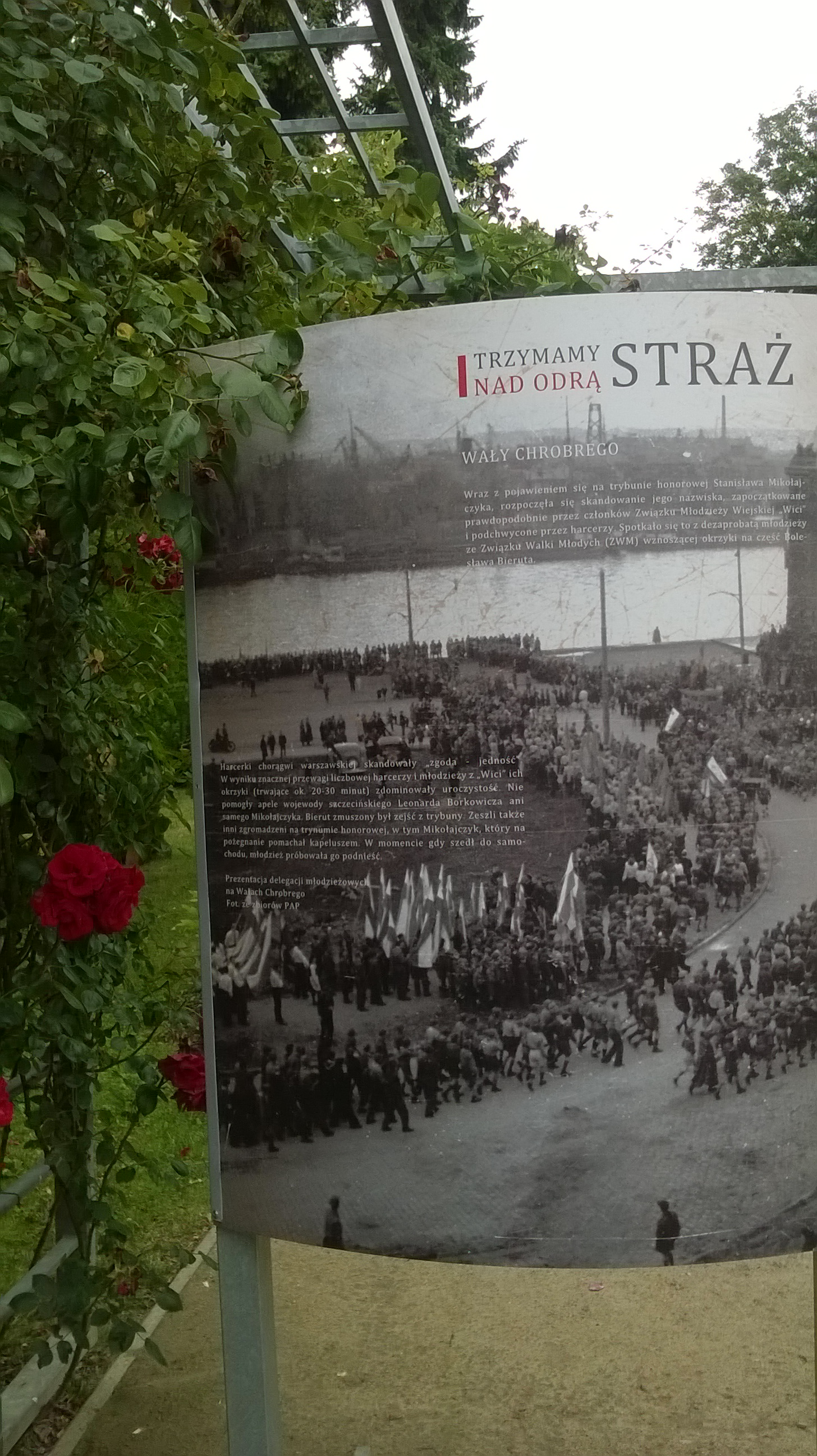 Wystawa historycznych fotografii w Ogrodzie Różanym w Szczecinie